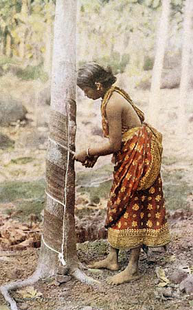 A woman in Sri Lanka in the process of harvesting rubber. Женщина собирает млечный сок (латекс) дерева на о-ве Шри-Ланка.